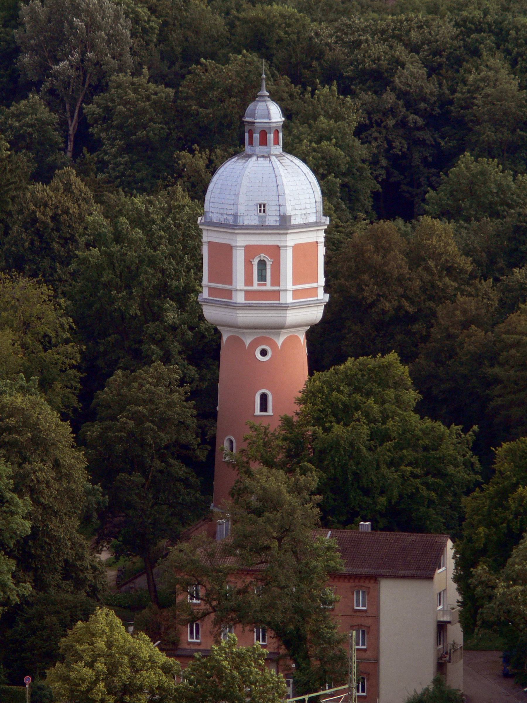 Neu-Ulmer Wasserturm im Kollmannspark; gebaut 1898-1900 als 47m hohe Stahlkonstruktion, die mit Putz und Stuck versehen ist; seit 1964 außer Betrieb (Quelle: Infotafel)